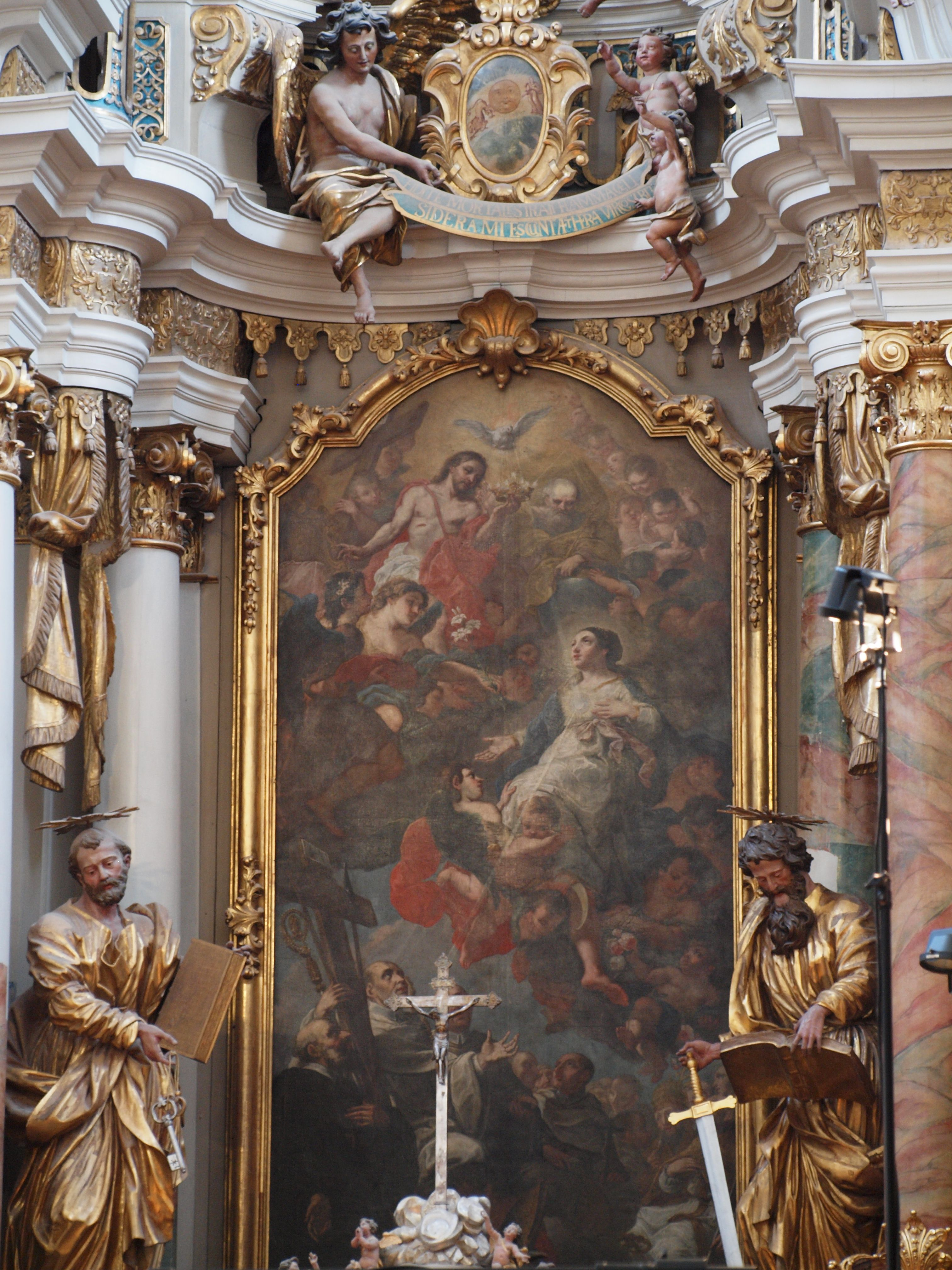 Paradyż, kościół p.w. Wniebowzięcia NMP - ołtarz z 1739 r.: obraz "Wniebowzięcie Najśw. Marii Panny", figury św. Piotra i Pawła